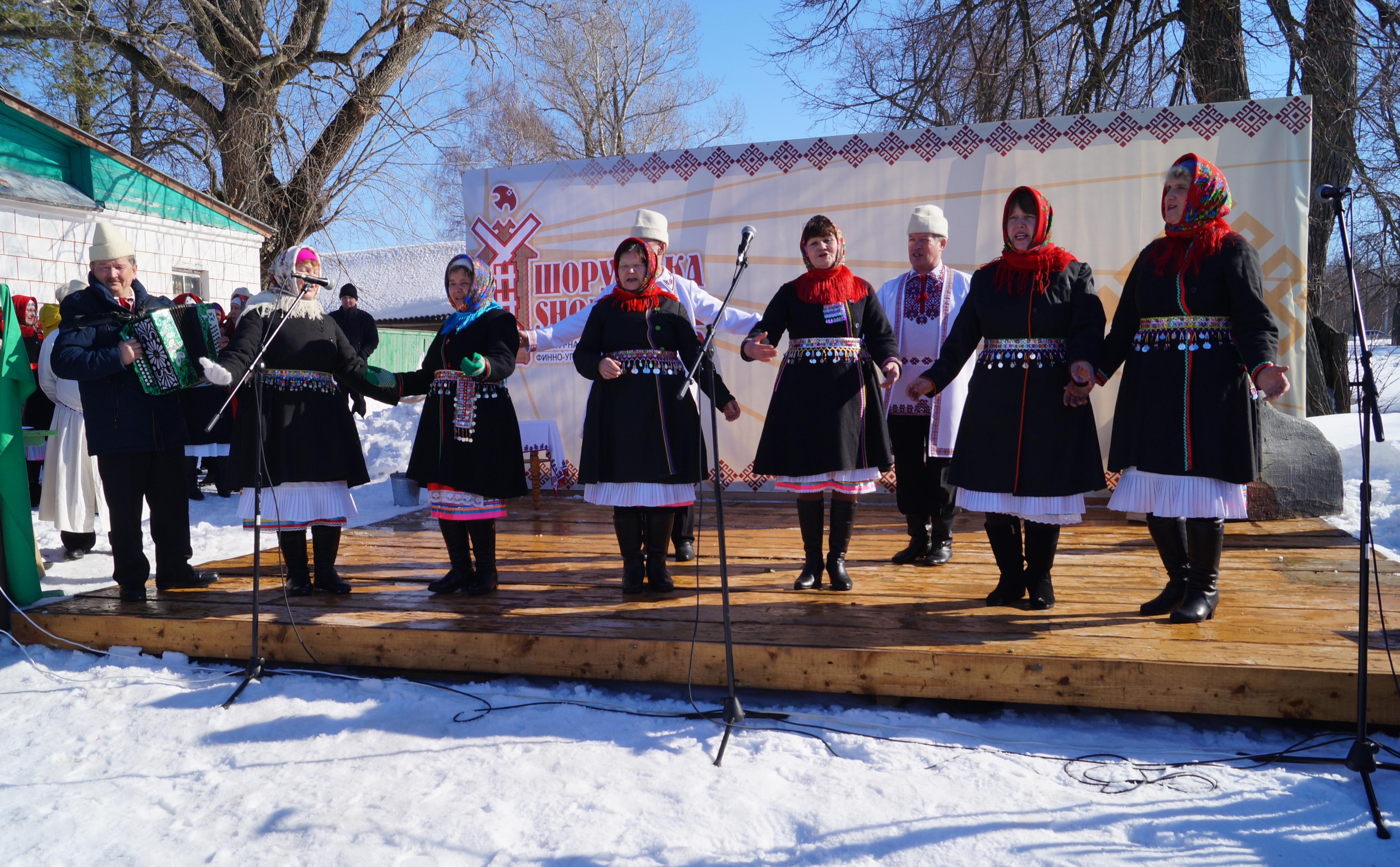 Марийский календарно-обрядовый праздник Ӱярня.